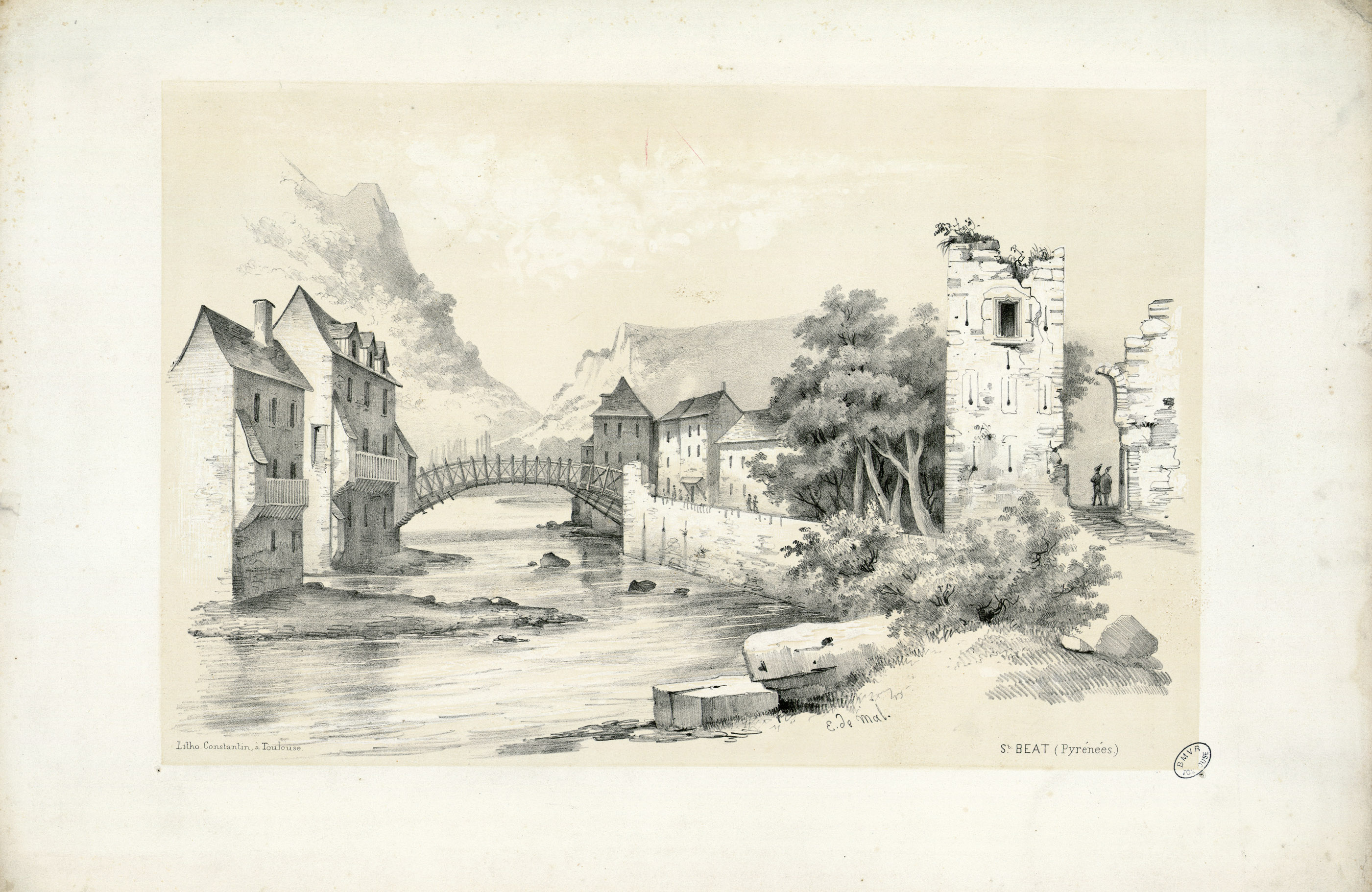 Fait partie d'un recueil de 23 planches lithographiées en camaïeu Ancely, René (1876 - 1966). Possesseur